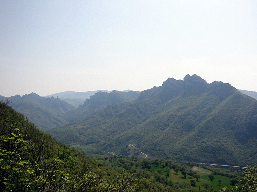 Dolomiti Lucane - Monti della Maddalena (Potenza)